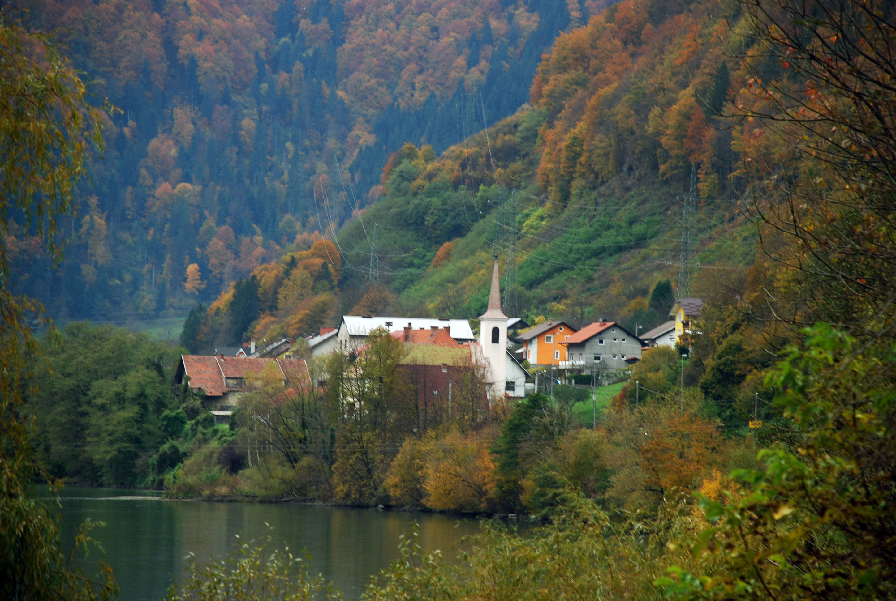 Ožbalt (St. Oswald im Drauwald, St. Oswald an der Drau) Slowenien, gesehen vom Ufer der Drau, östlich des Ortes